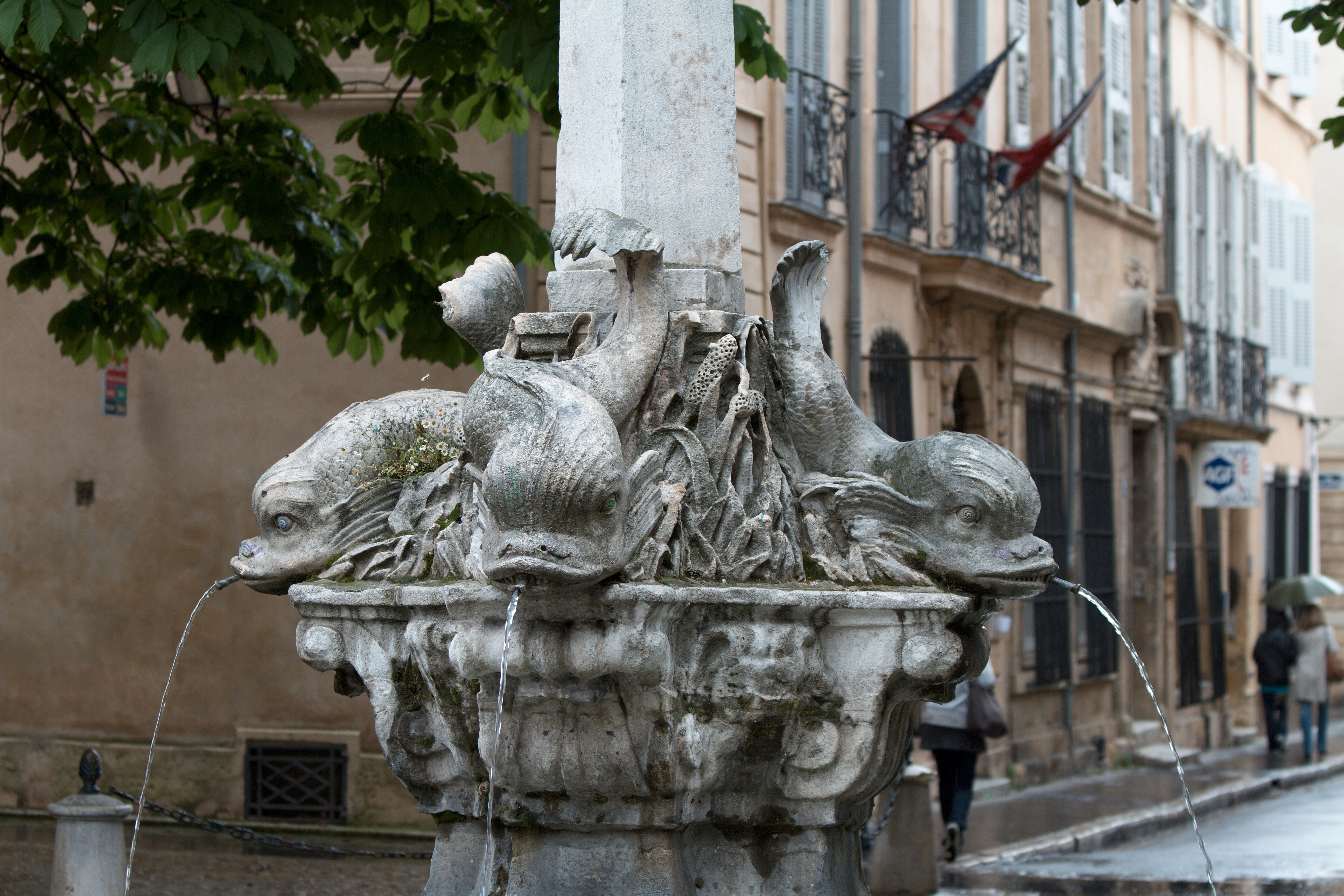 Fontaine des Quatre-Dauphins, Aix-en-Provence (France).